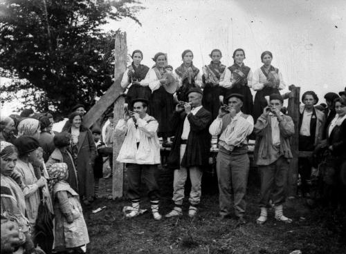 Zeanuriko albokalari eta pandero joleak.